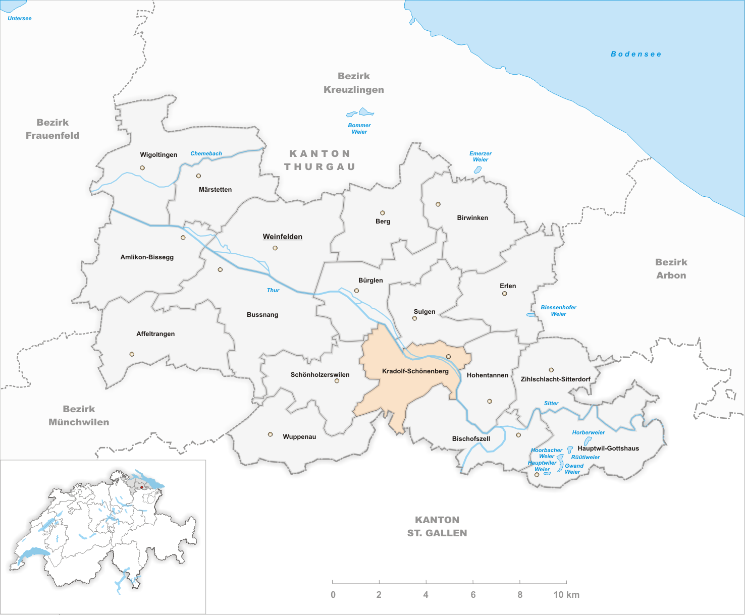 Municipality Kradolf-Schönenberg